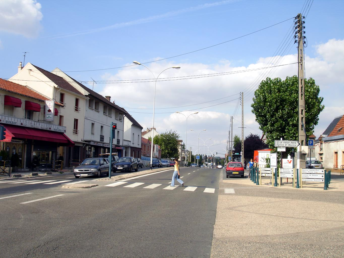 L'avenue de Stalingrad à Garges-lès-Gonesse (Val-d'Oise), France